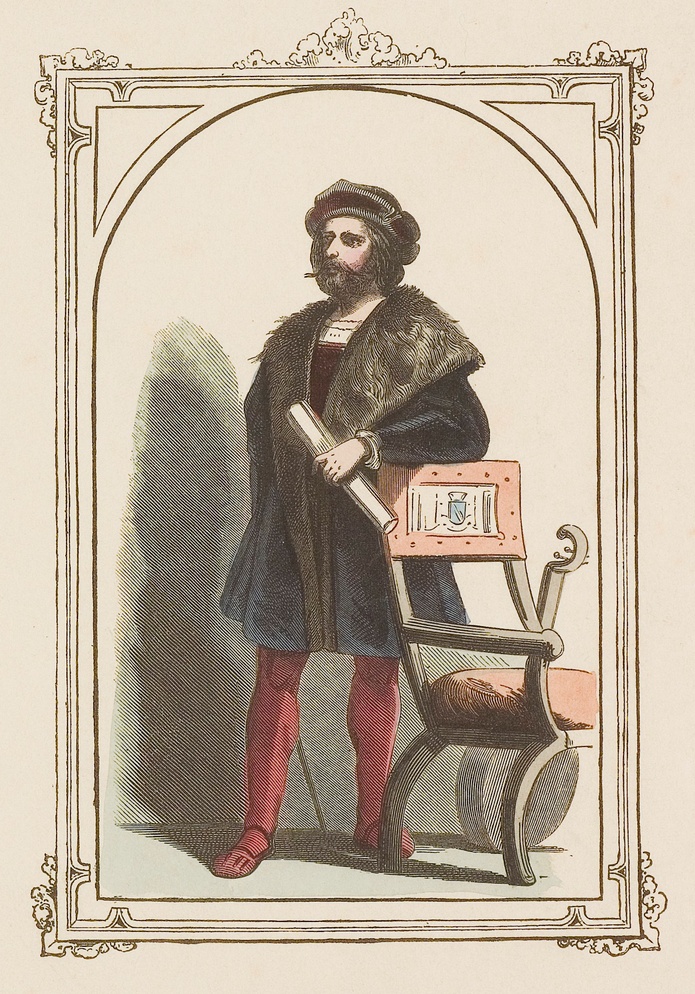 Depicted person: Pierre de La Rue